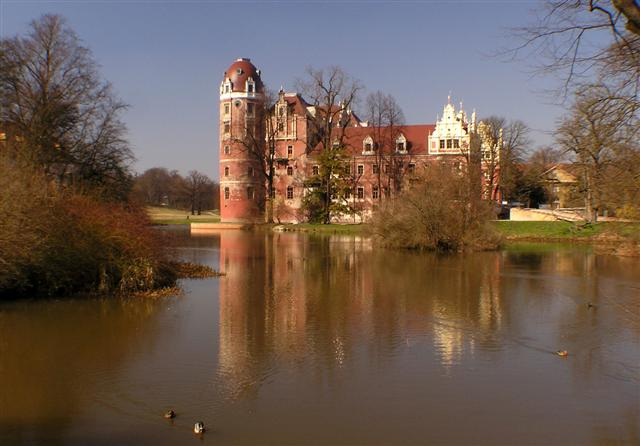 Das neue Schloss in Bad Muskau